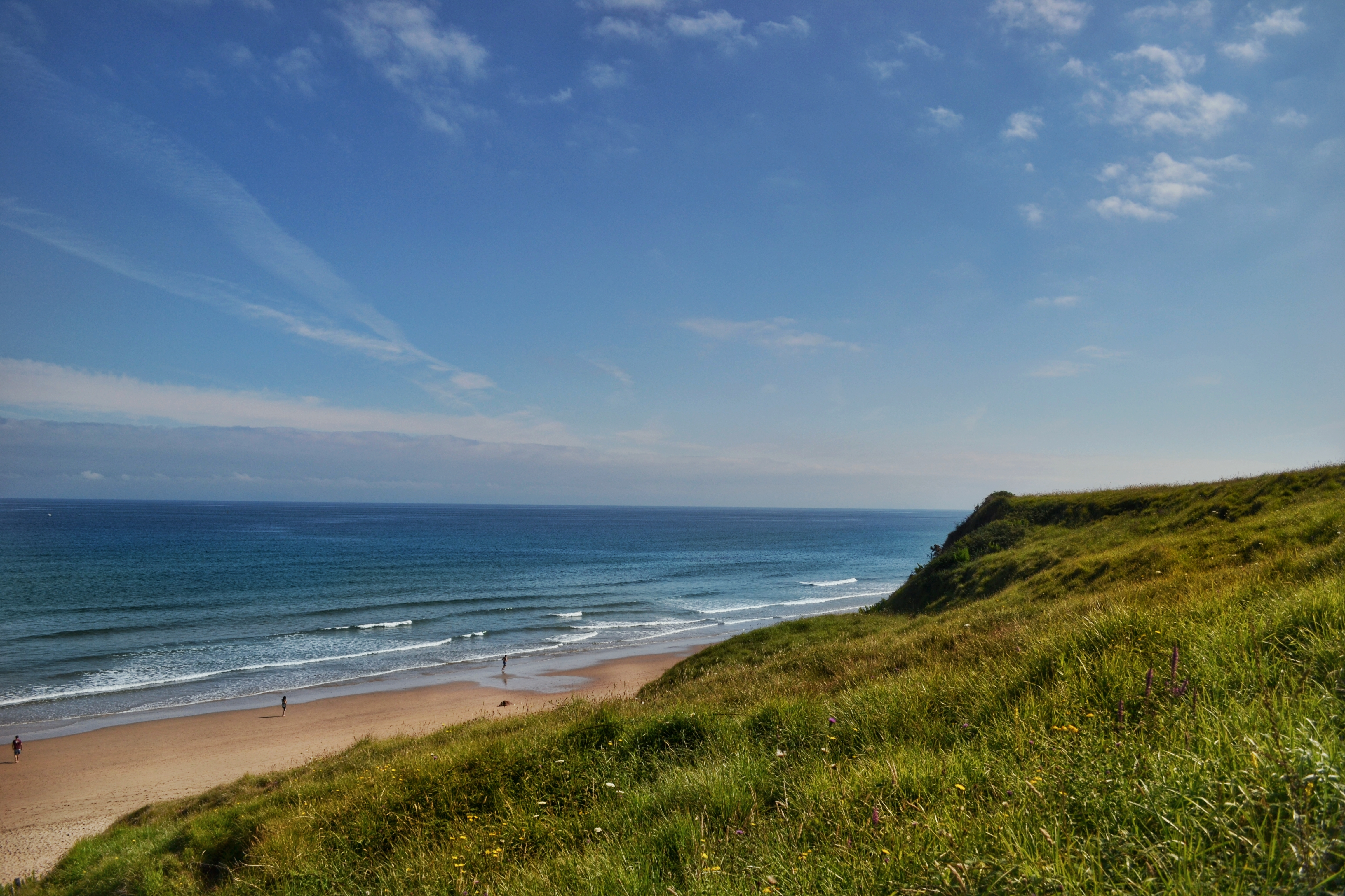 Vista general de la playa de la Vega, perteneciente al condejo de Ribadesella (Asturias). This is a photography of a Special Area of Conservation in Spain with the ID: ES1200047. Natura2000 entry, EEA entry